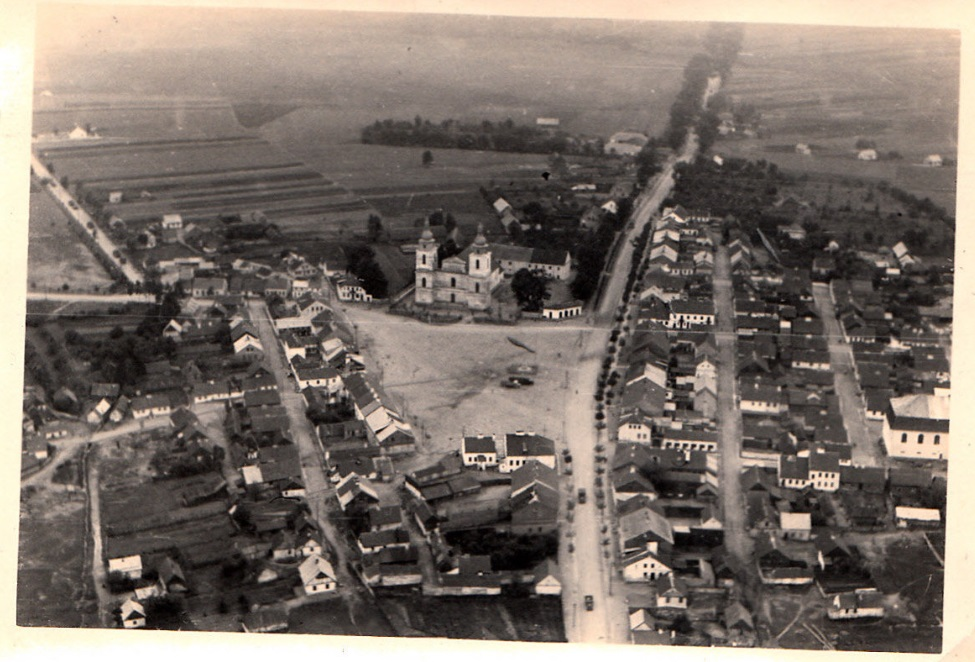 W tle kościół pw. św. Antoniego Padewskiego oraz Wielka Synagoga.